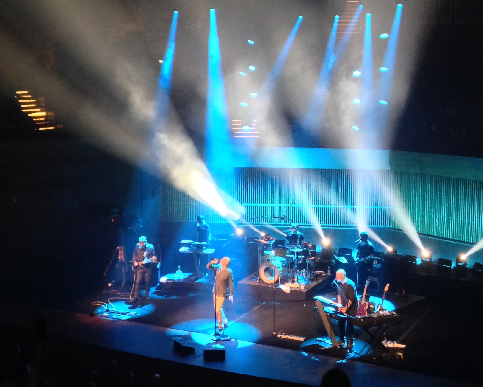 Gangway i DR Koncerthuset den 7. oktober 2017